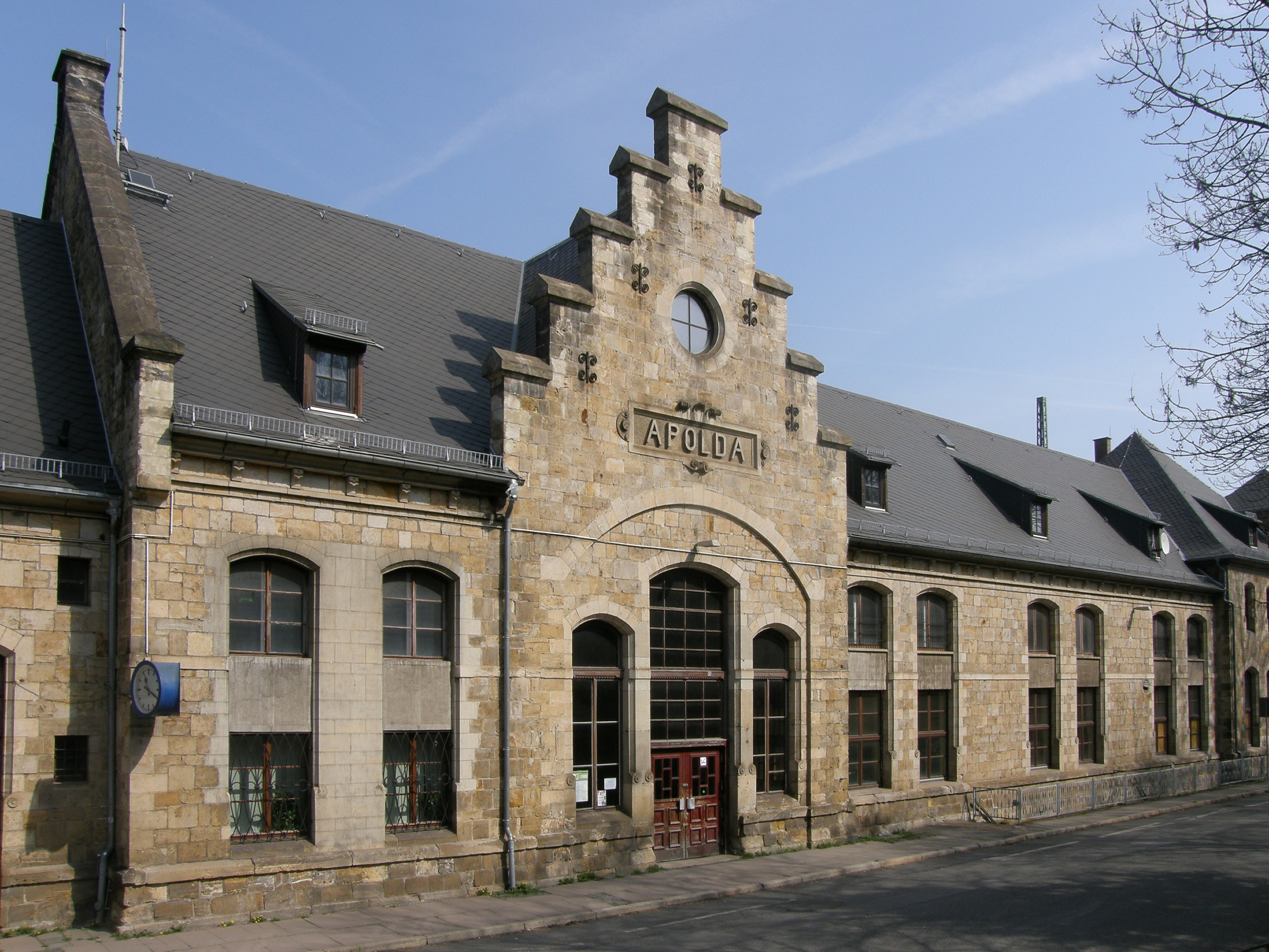 Stadt Apolda - Bahnhofsgebäude Frontseite